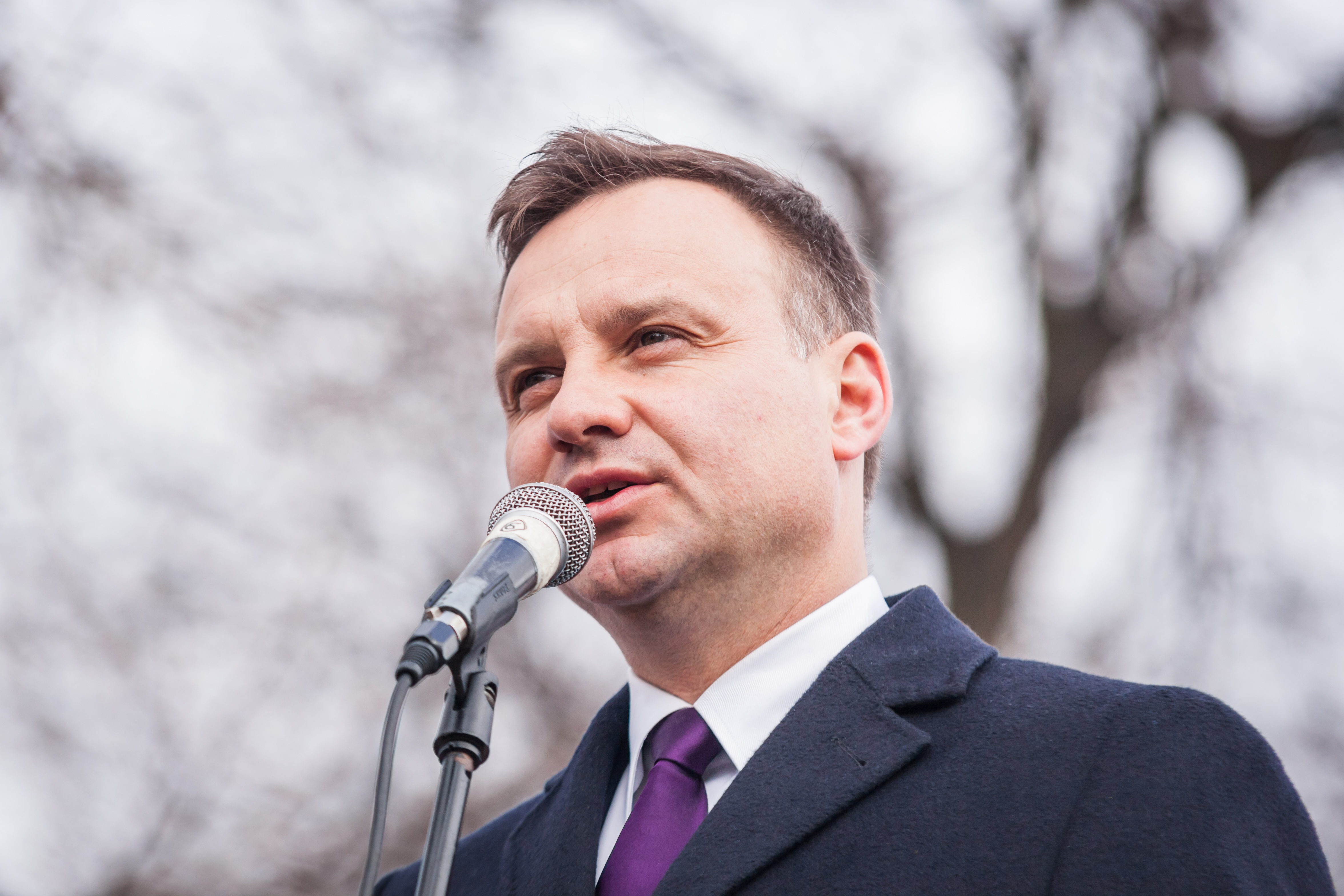 Andrzej Duda podczas kampanii w wyborach prezydenckich 2015. Wizyta w Lubartowie